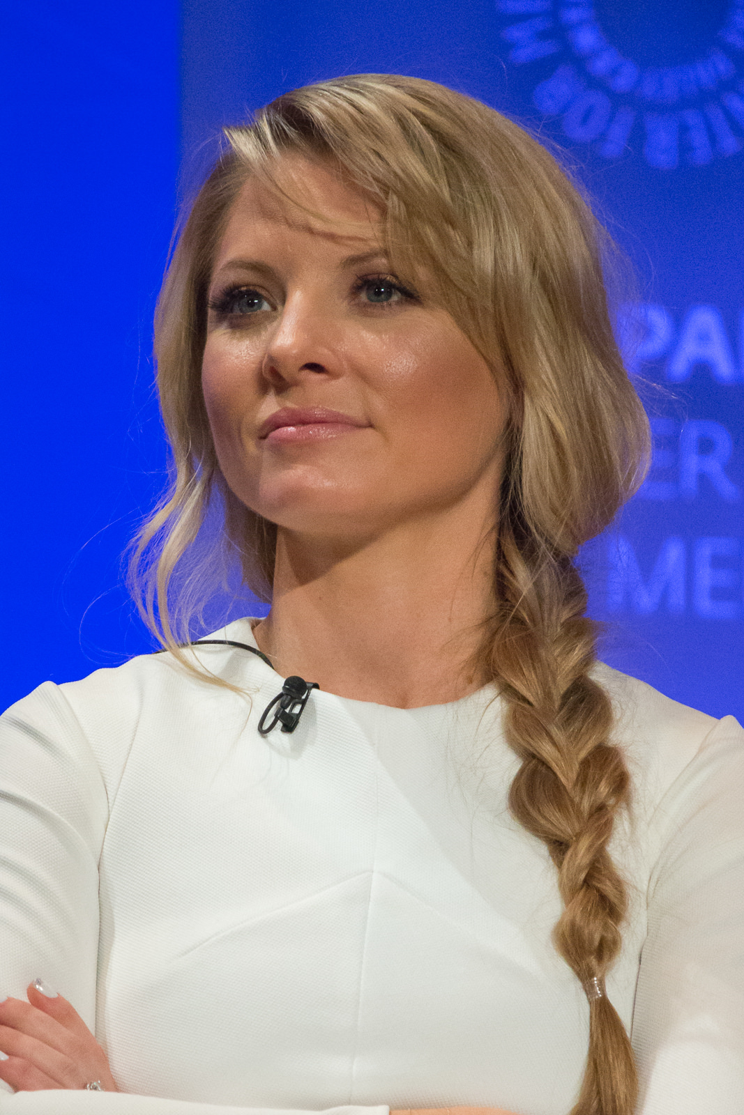 PaleyFest Los Angeles 2016